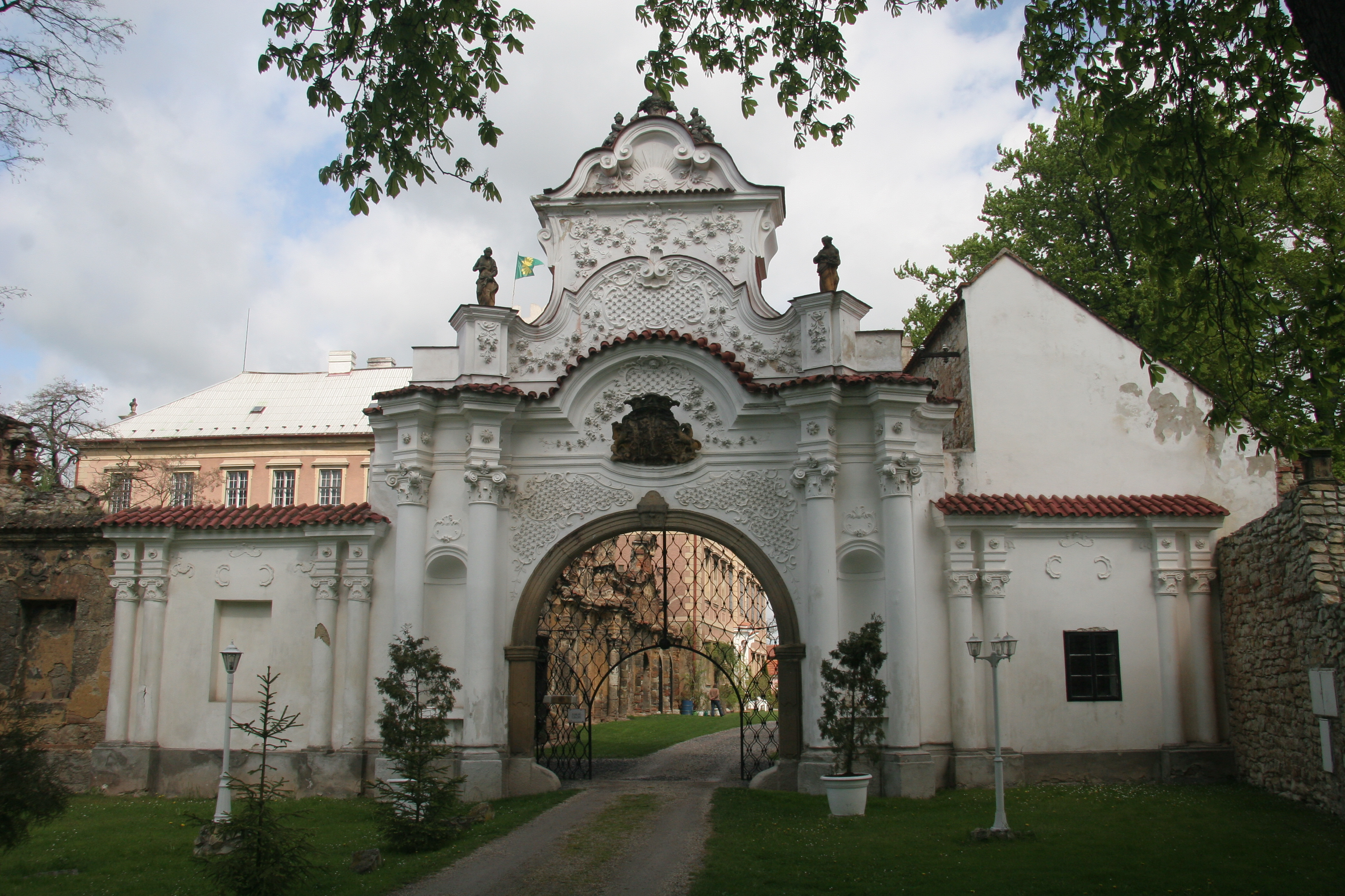 Zámek Líčkov, Železná 1, Líčkov